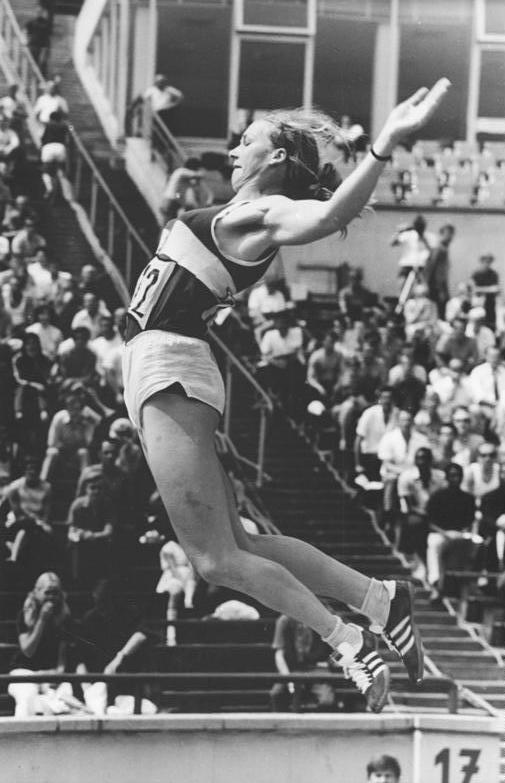 Monika Peikert ADN-ZB Kluge 2.11.71 -Cottbus: Leichtathletin Monika Peikert Kandidatin für den Bezirkstag. Die 19jährige Fünfkämpferin Monika Peikert (SC Cottbus - Foto von den diesjährigen DDR-Meisterschaften in Leipzig) wurde von der FDJ-Grundeinheit ihres Sportklubs als Kandidatin für den Bezirkstag vorgeschlagen. Die Studentin an der Ingenieurhochschule Cottbus möchte sich im Falle ihrer Wahl besonders für den Studentensport in der Kommission Jugendfragen und Sport verantwortlich fühlen. Mit 5061 Punkten gelang Monika Peikert der Sprung in die europäische Spitzenklasse der Fünfkämpferinnen.